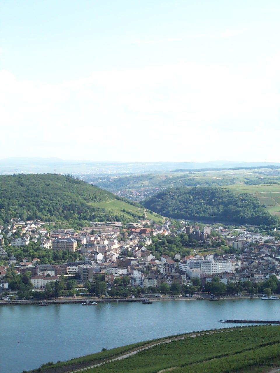 Bingen, Germany, view from Rüdesheim